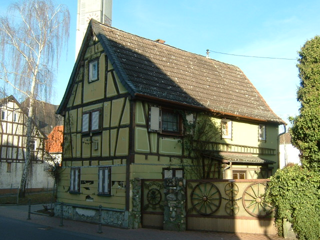 Schwalbach am Taunus, Fachwerkhaus